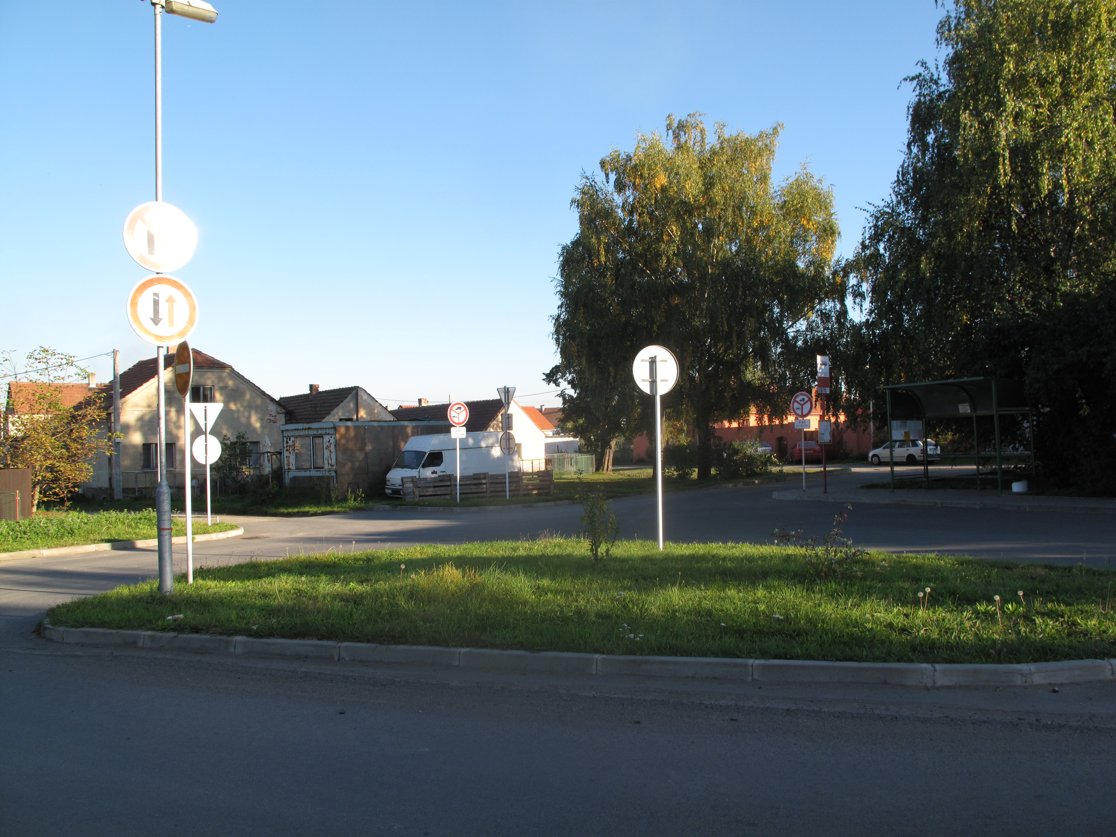 Česky: Dřínov